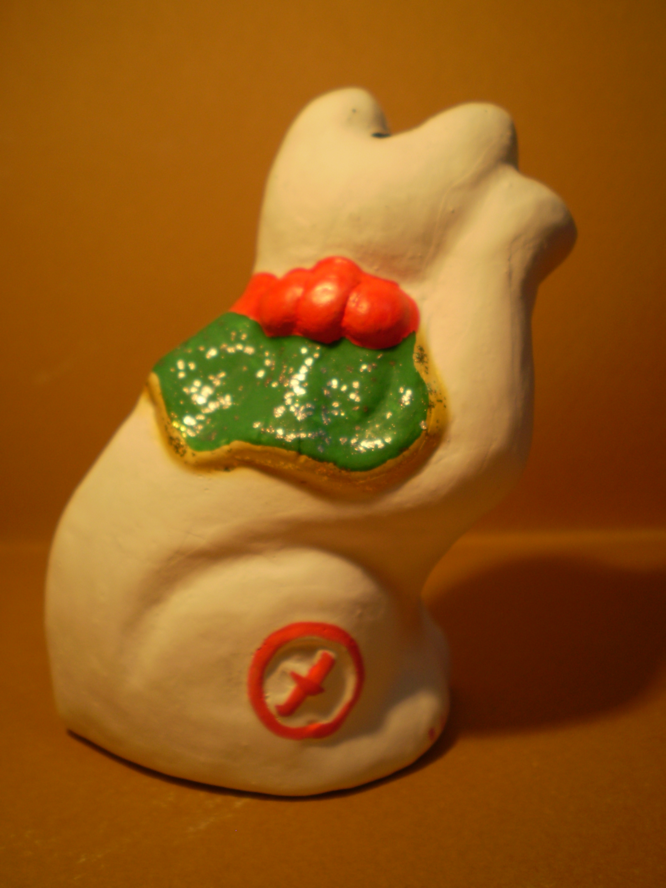 今戸焼 丸〆猫 嘉永安政風型 裏面